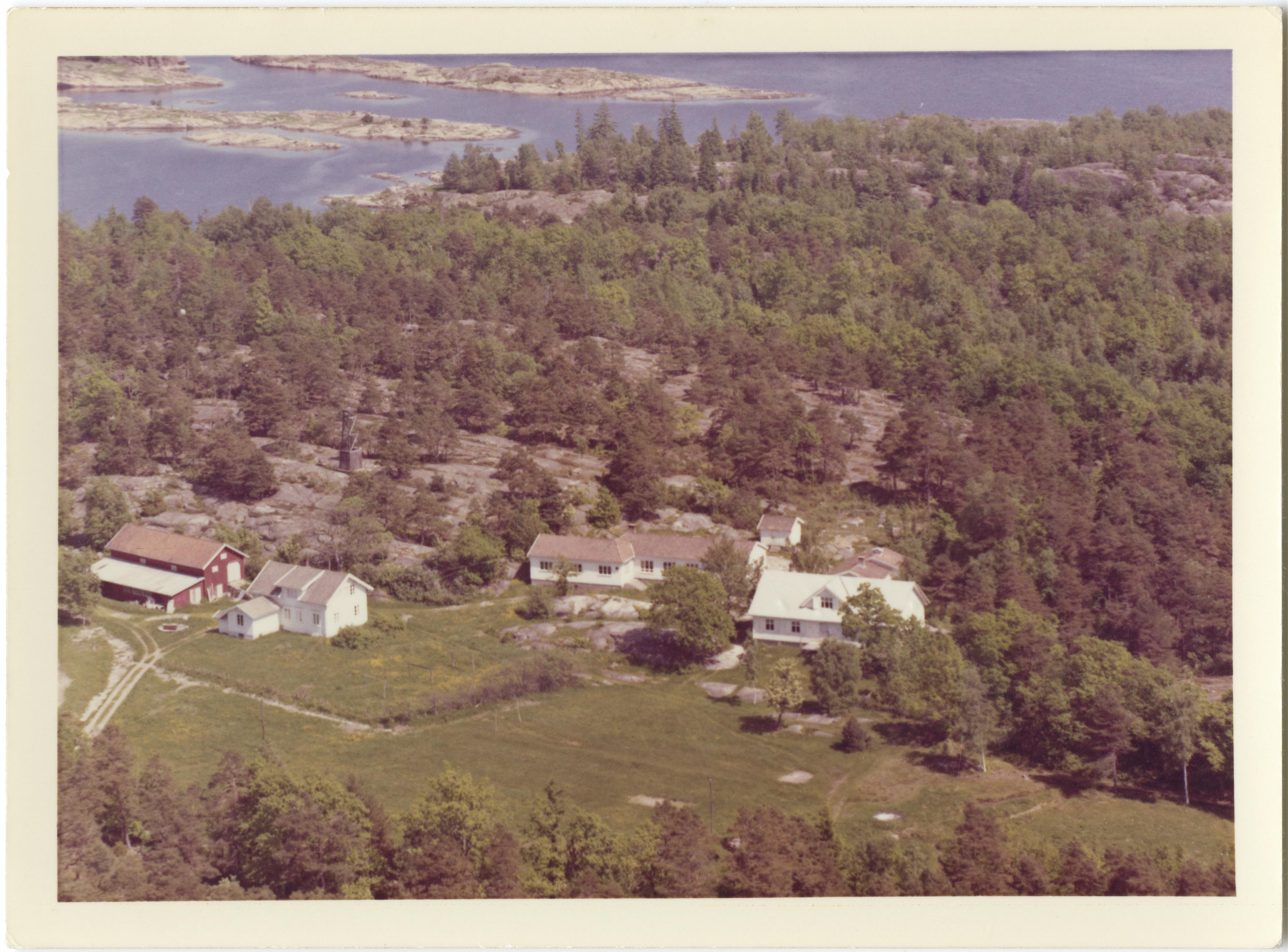 WF.S.164649